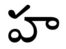 хакараму